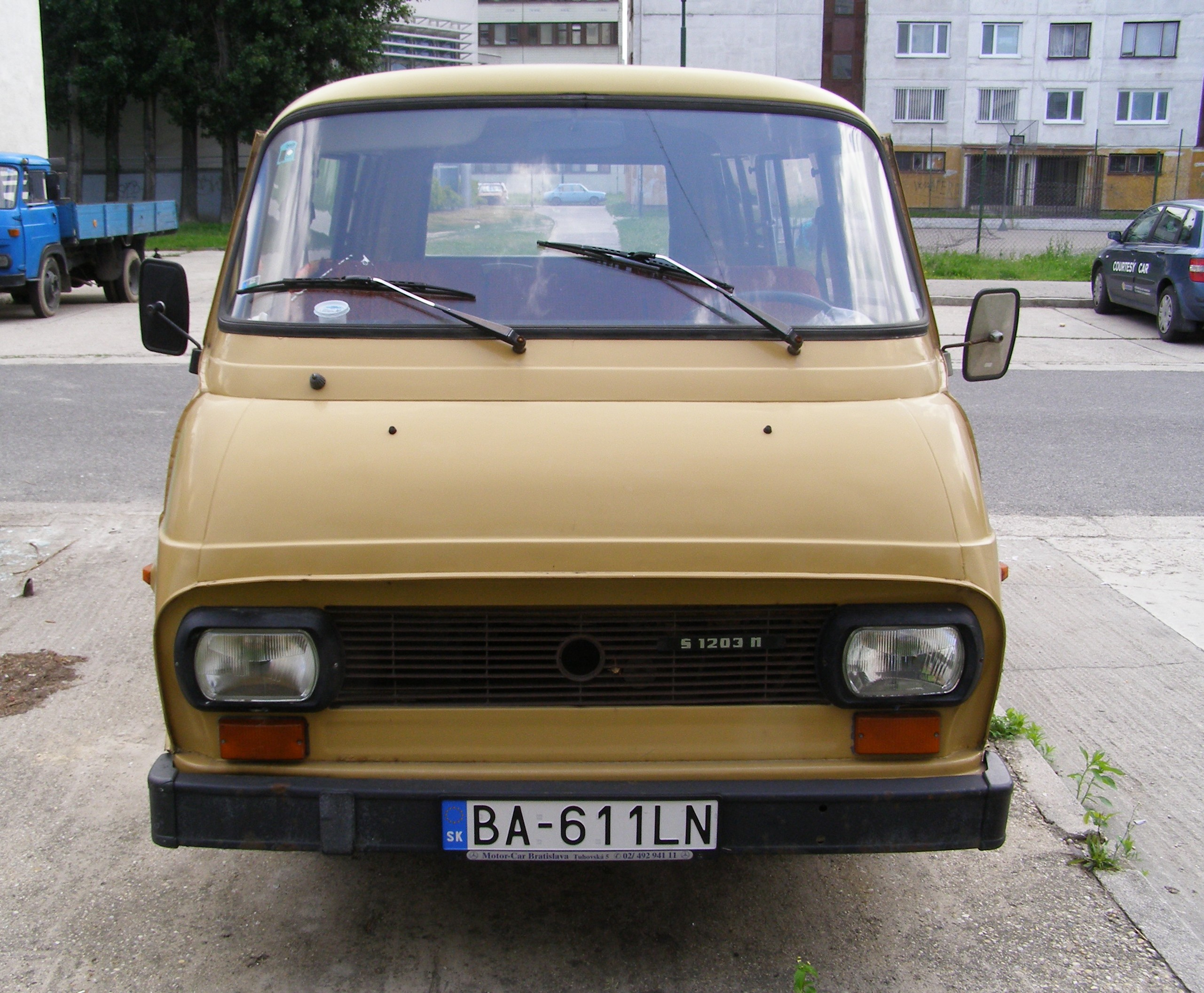 Škoda 1203 in Bratislava, Slovakia